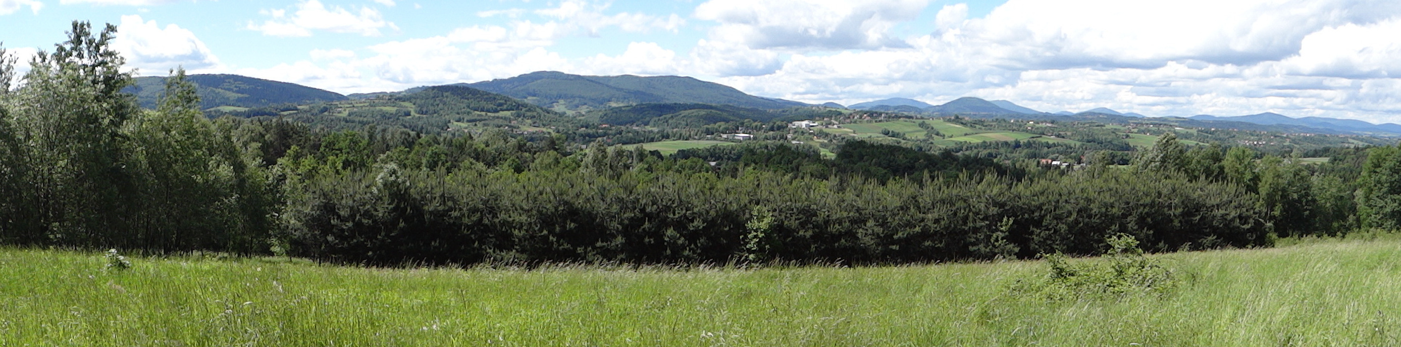 Panorama Beskidu Wyspowego spod szkoły w Muchówce